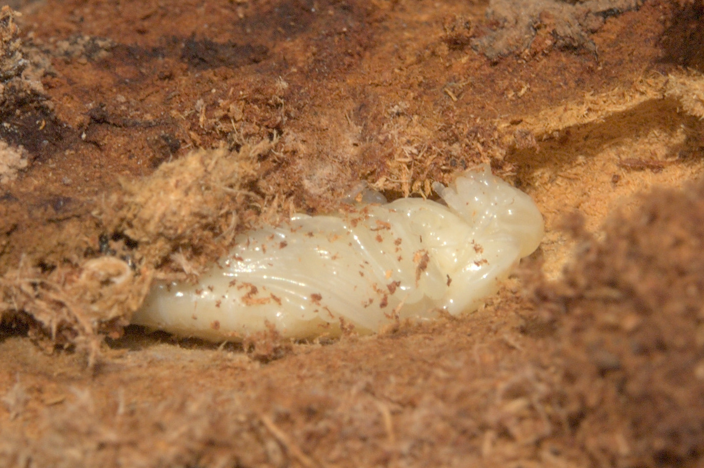 Crisálida con la forma del adulto